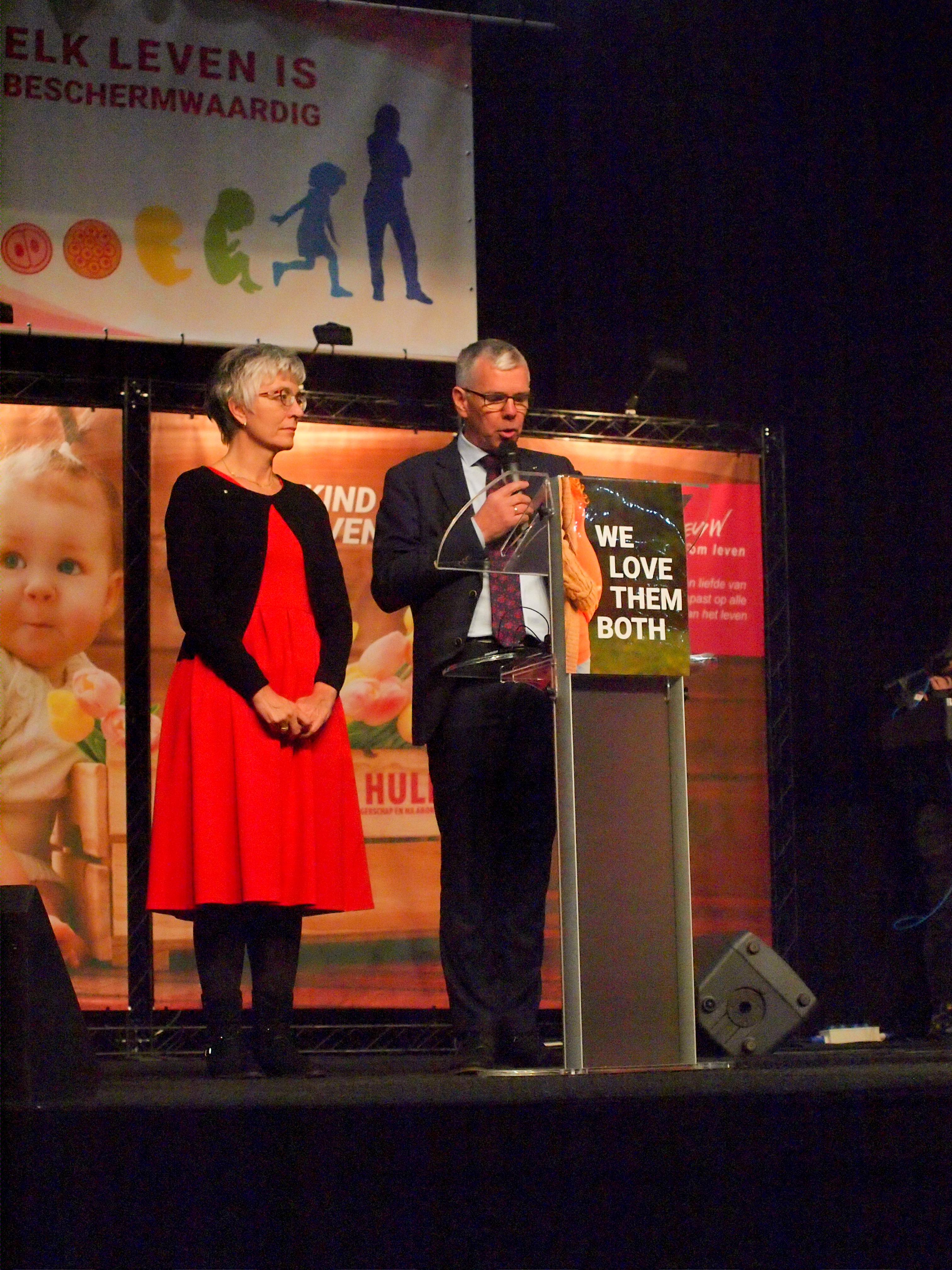 Kees en Anne-Mieke van Helden, tijdens Mars voor het Leven 2019